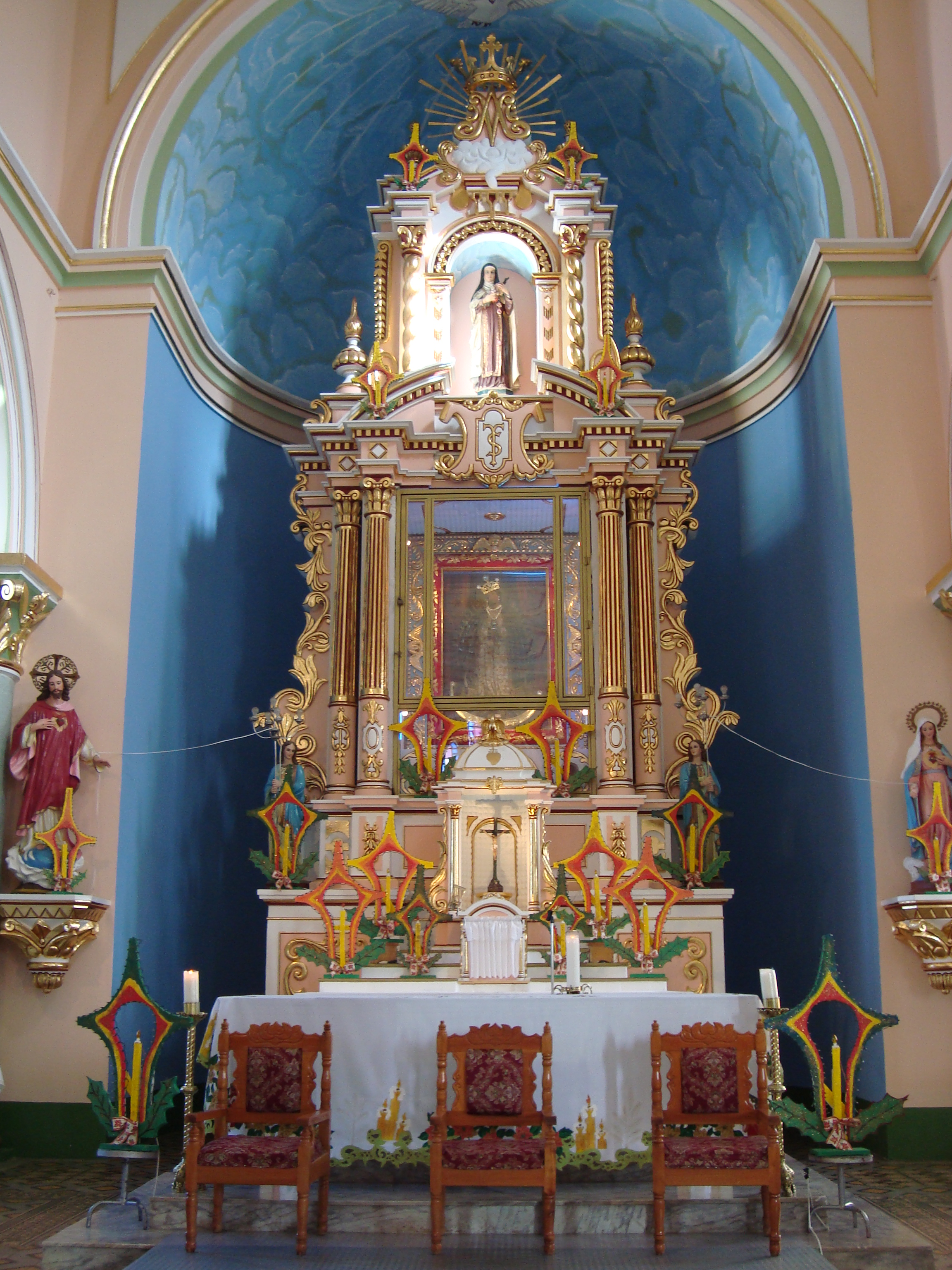 ALTAR IGLESIA DE GUCAN